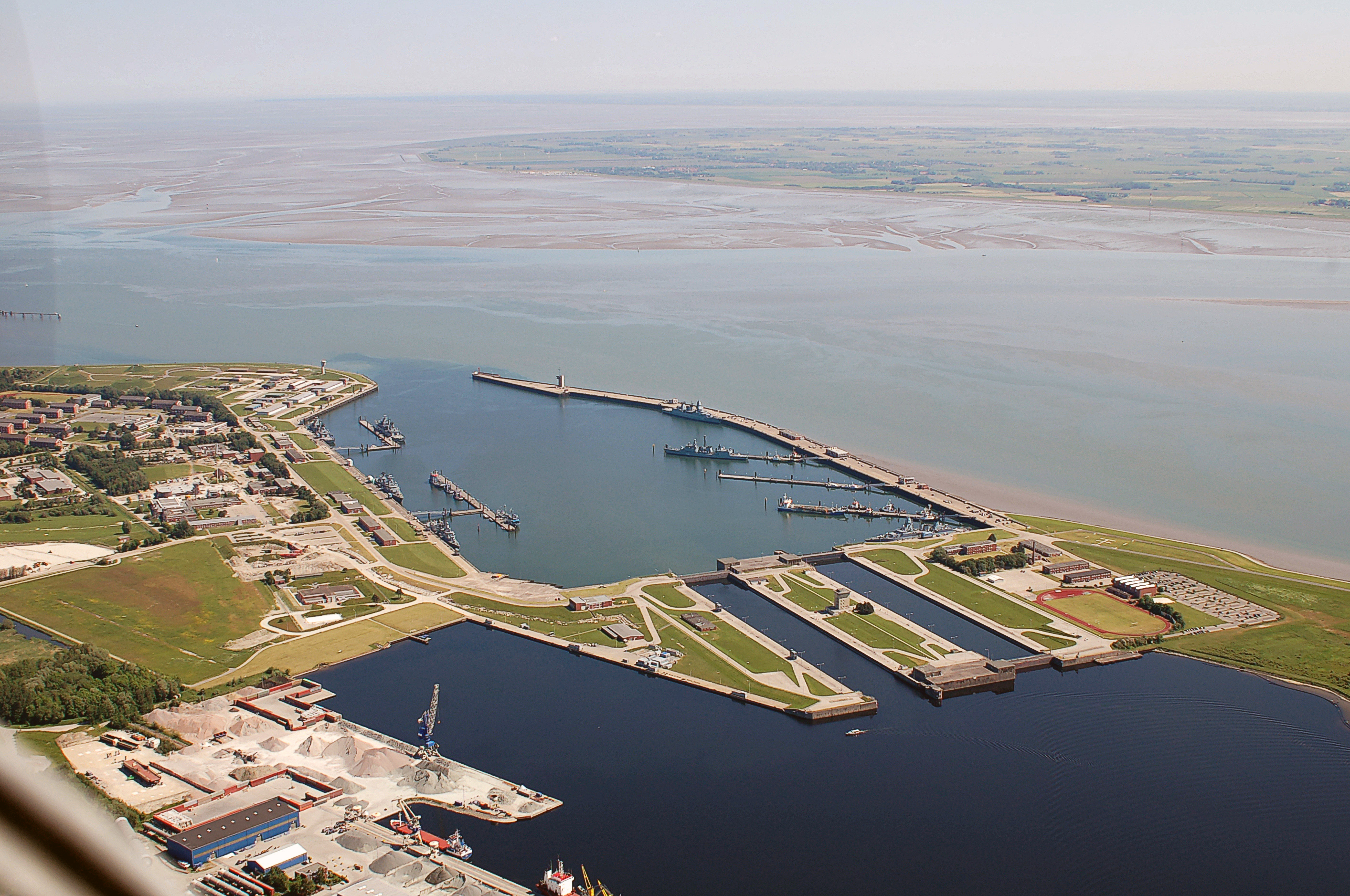 Luftbilder von der Nordseeküste 2012-05